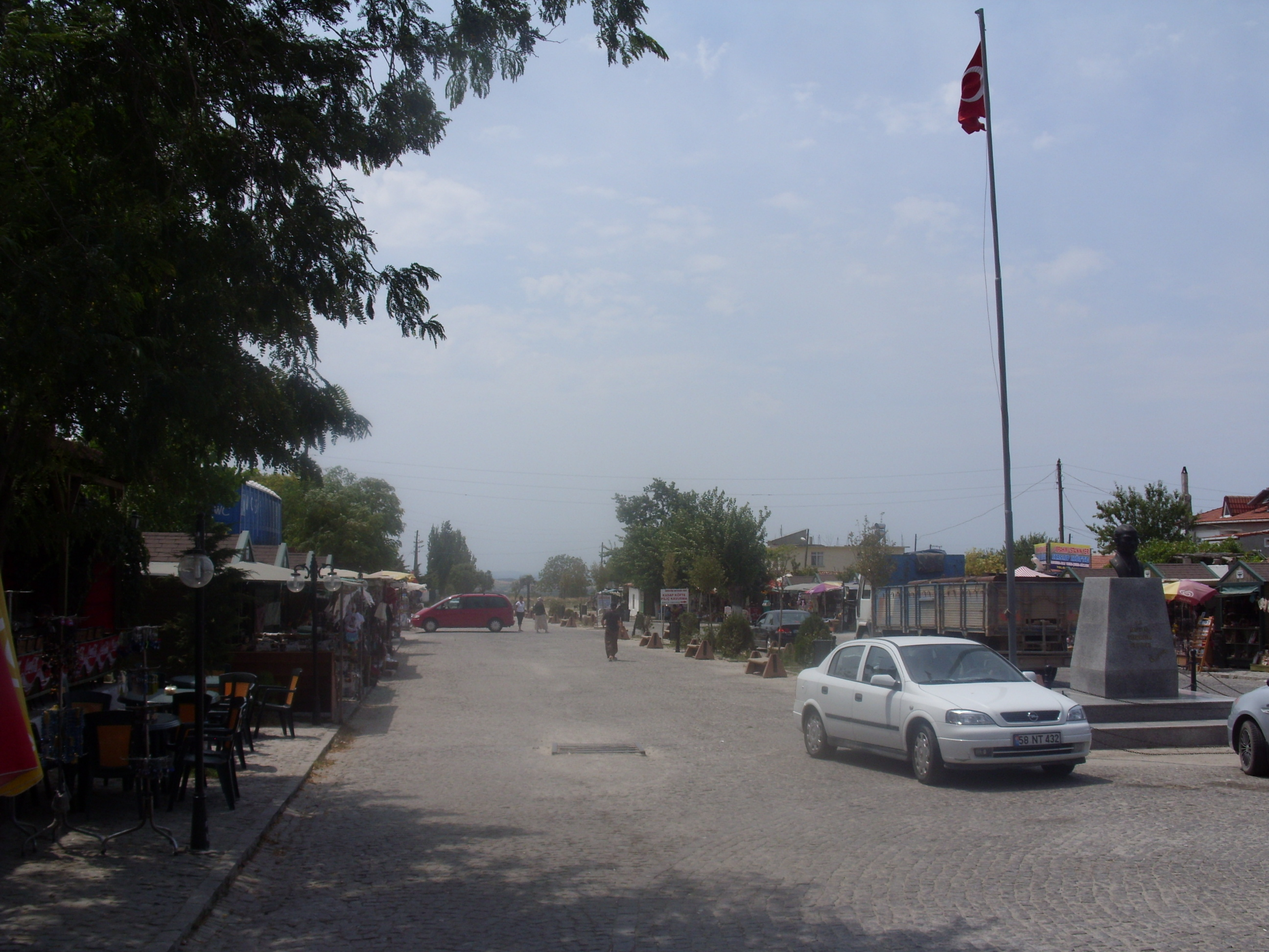 ALÇITEPE KÖYÜ